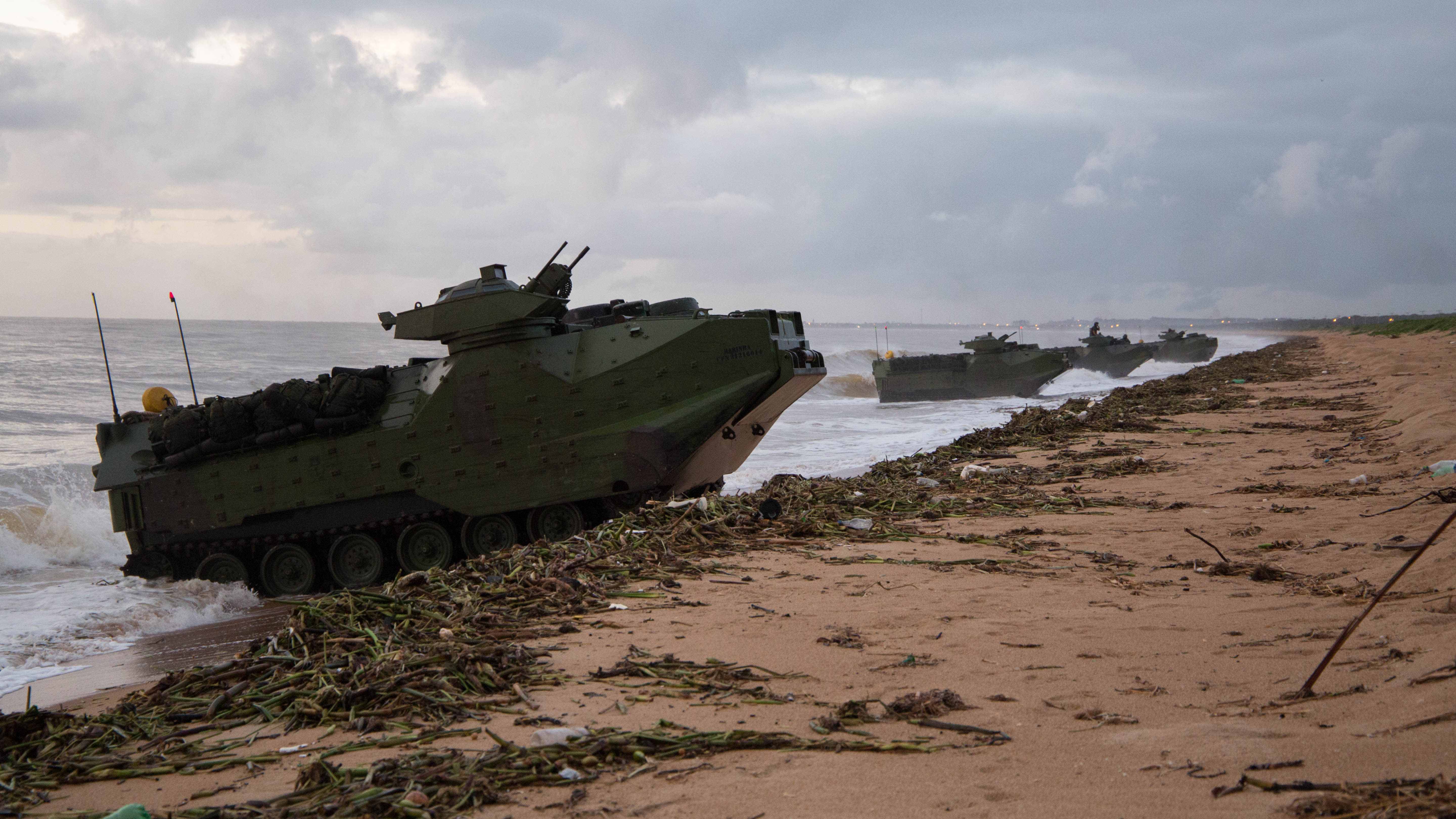 Arquivo liberado pela Marinha do Brasil através de projeto GLAM com Wiki Educação Brasil